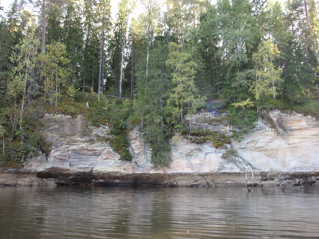 Mõsumägi 2015 septembris